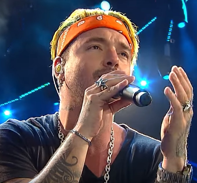 Directamente desde Medellín, Colombia, José Álvaro Osorio Balvin, conocido por su nombre artístico como J BALVIN, se presenta por primera ante el público chileno eligiendo al “monstruo” de la Quinta Vergara como primer jurado de su show, entregando una performance sobre el escenario que mantuvo encendida a las más de 15 mil personas que asistieron a esa noche de cierre del Festival de Viña 2017